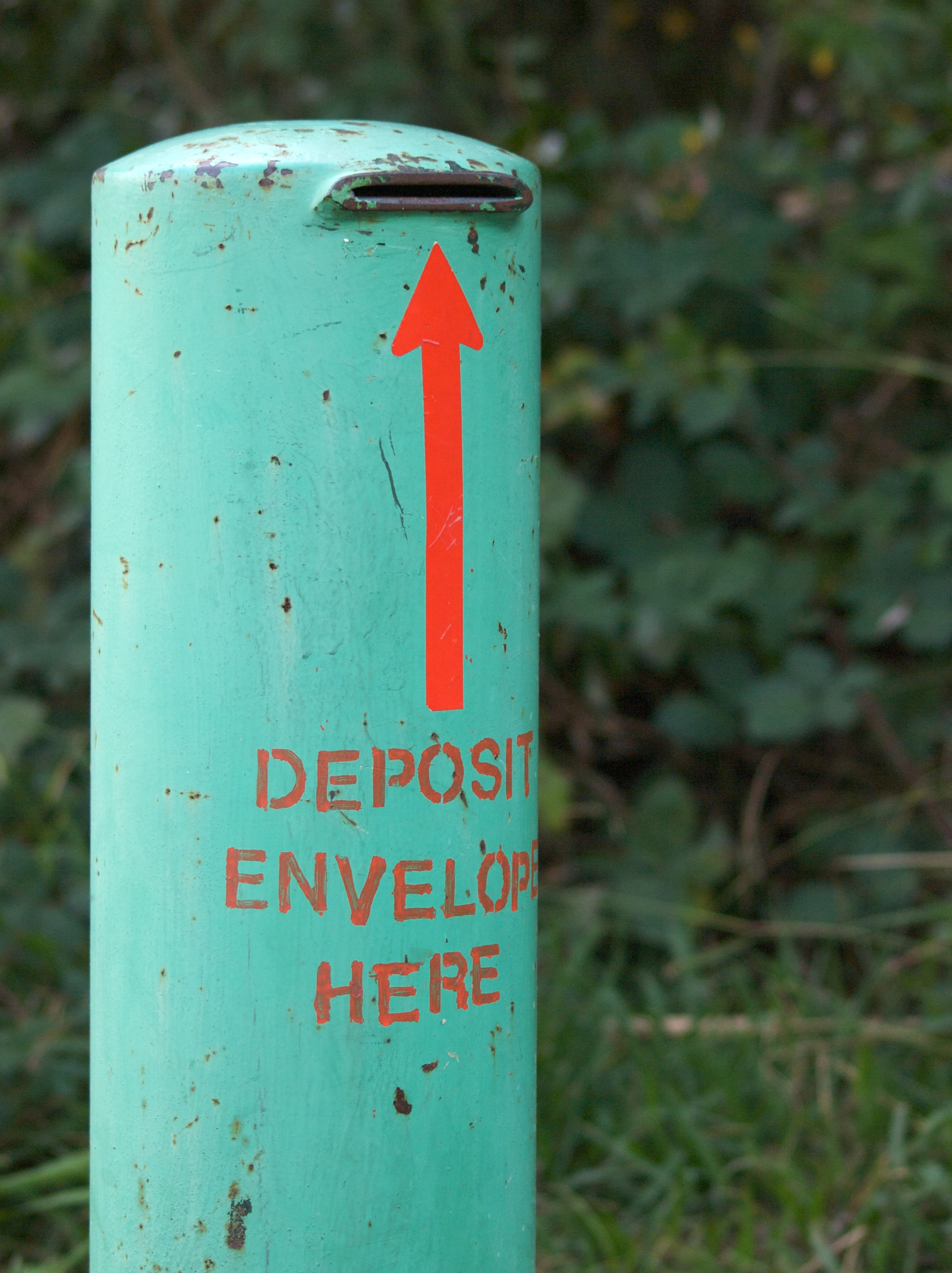 Day-use deposit at Benicia State Recreation Area.